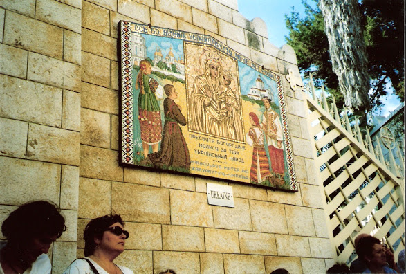 Izrael, Nazaret, mozaika w arkadach Bazyliki Zwiastowania Pańskiego